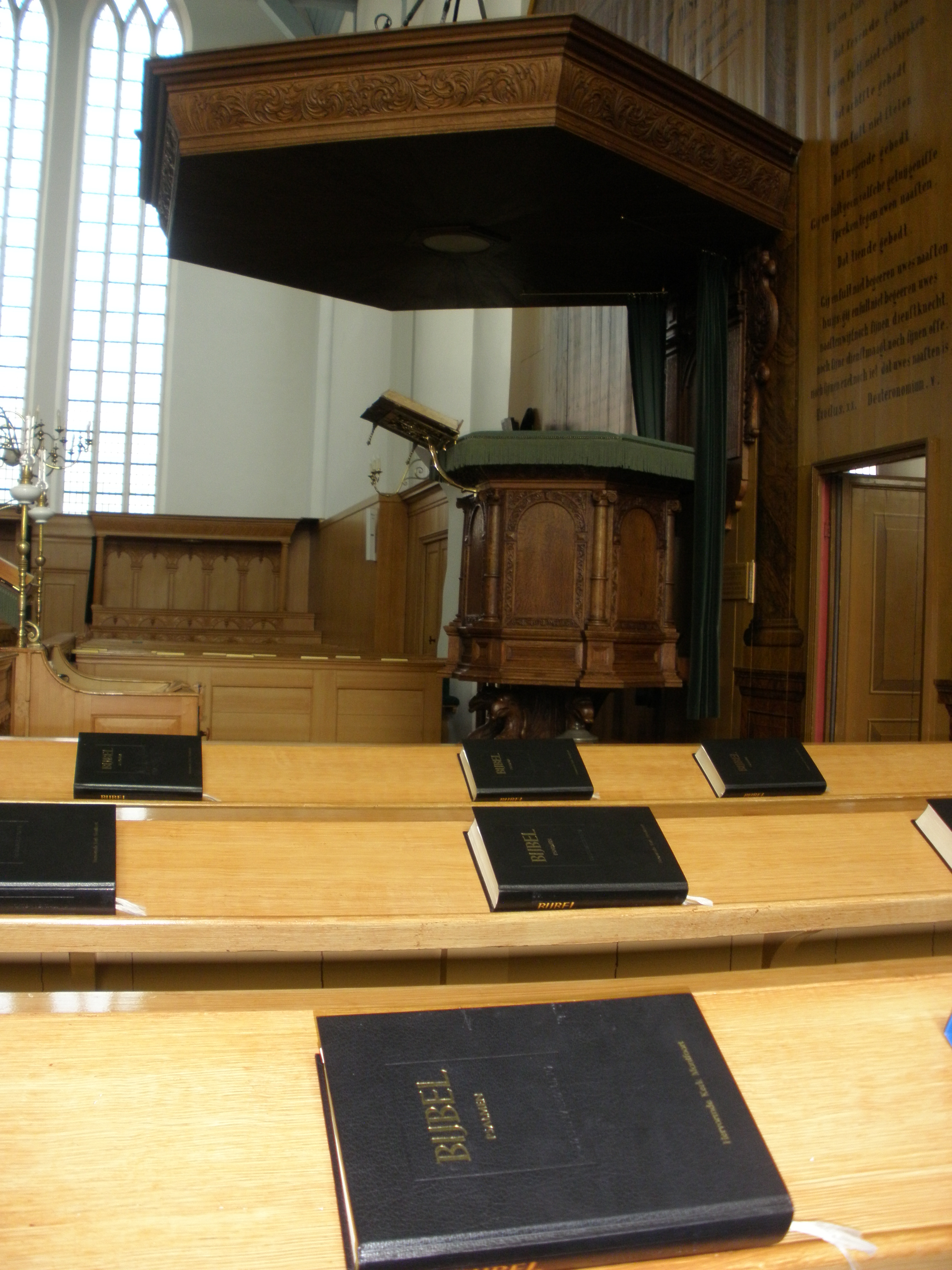 Grote of Sint-Janskerk Montfoort.